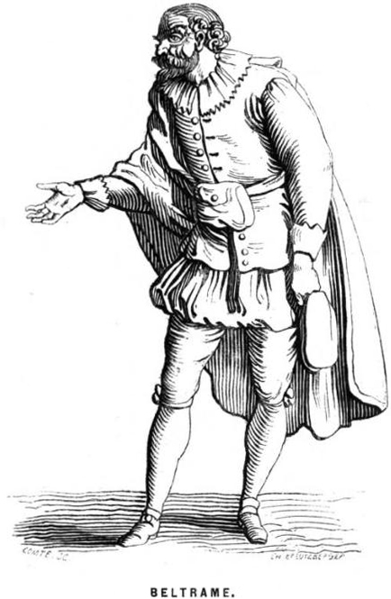 Beltrame (1576-1641)